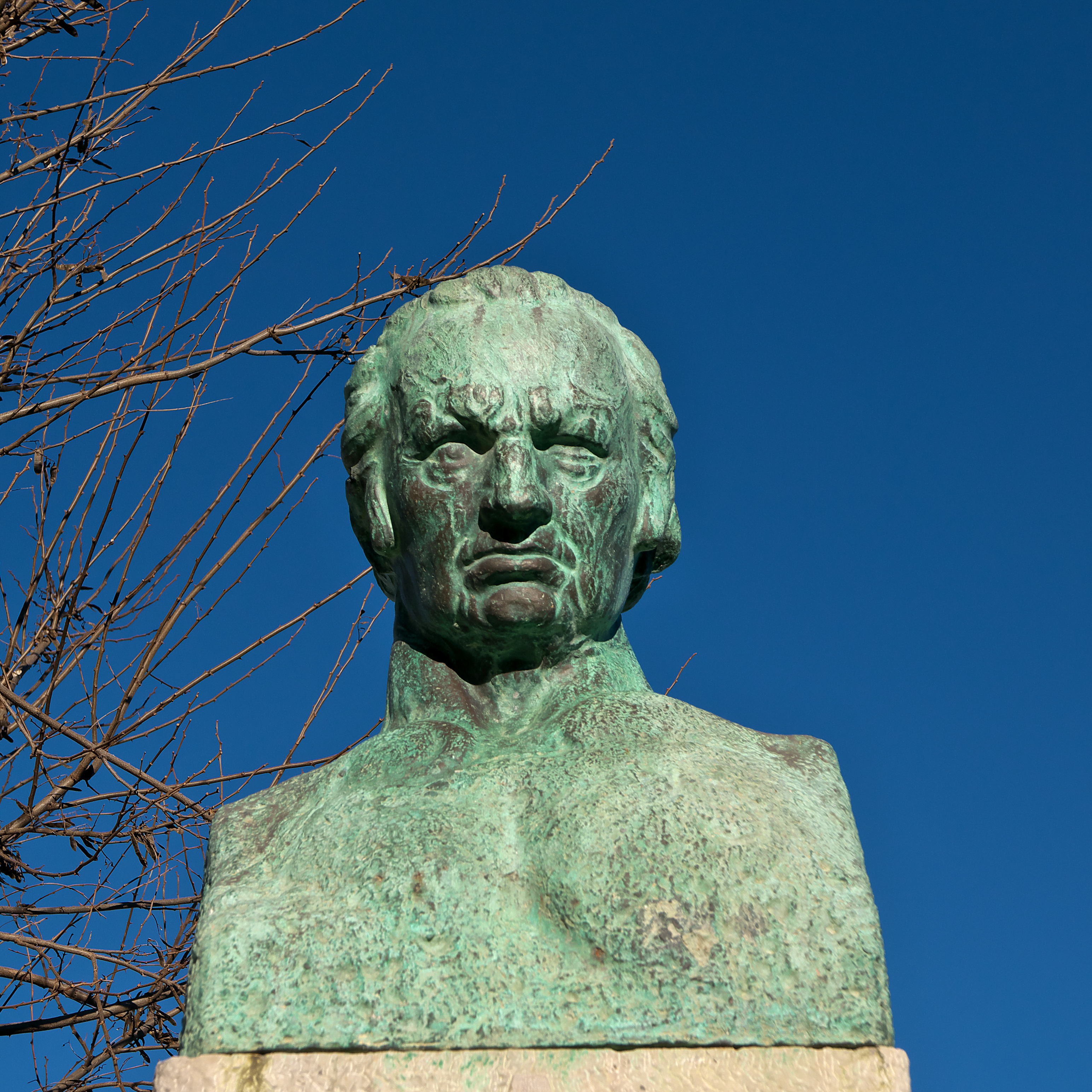 Busto en bronce (1920) de Francisco de Goya, obra de Julio Antonio Rodríguez Hernández.